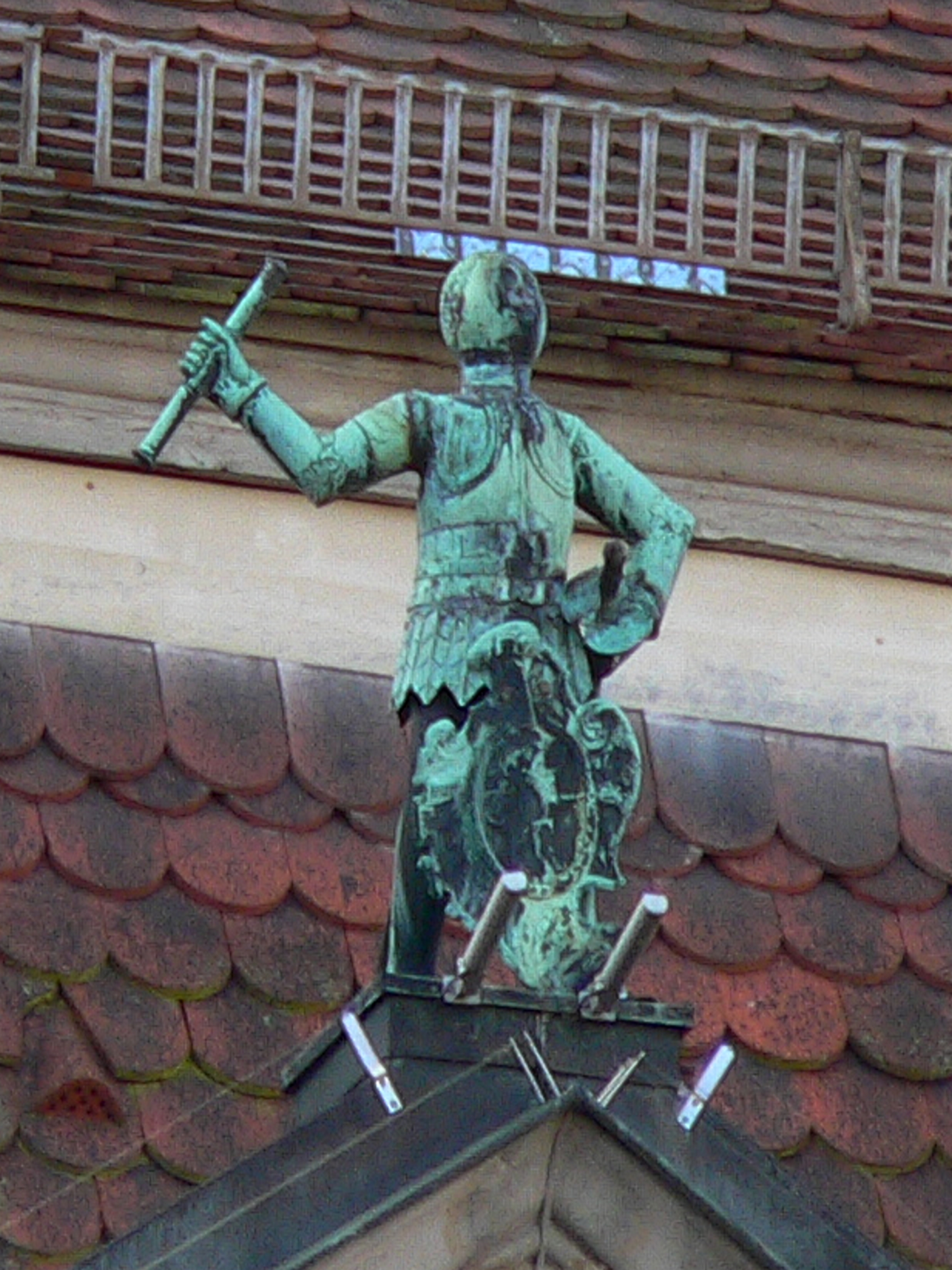 "Bratwurstmännle" auf dem Rathausgiebel in Coburg (Oberfranken - Deutschland). Der Marschallstab in der rechten Hand der Figur ist 31cm lang und dient als Mindestmaß für die rohe Coburger Bratwurst.